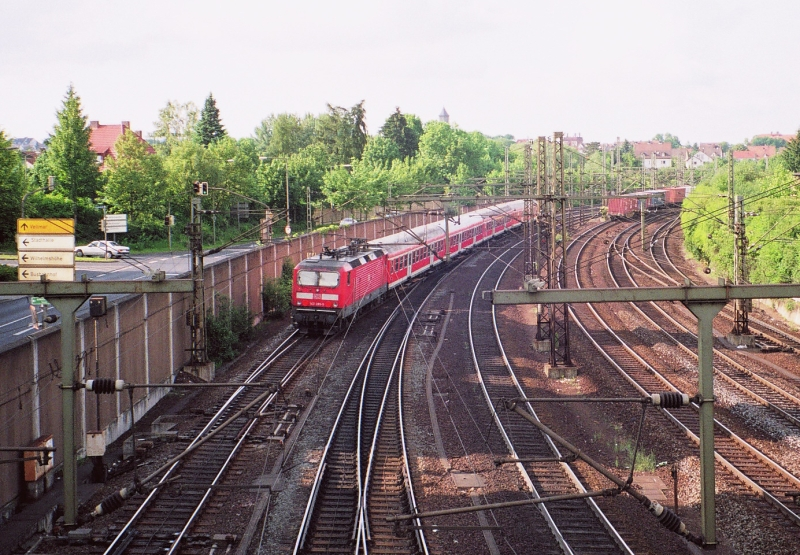 Regionalexpresss Kassel-Halle (S) verlässt Wilhelmshöhe - Train Kassel-Halle (Saale) is leaving Kassel-Wilhelmshöhe, Hesse, Germany